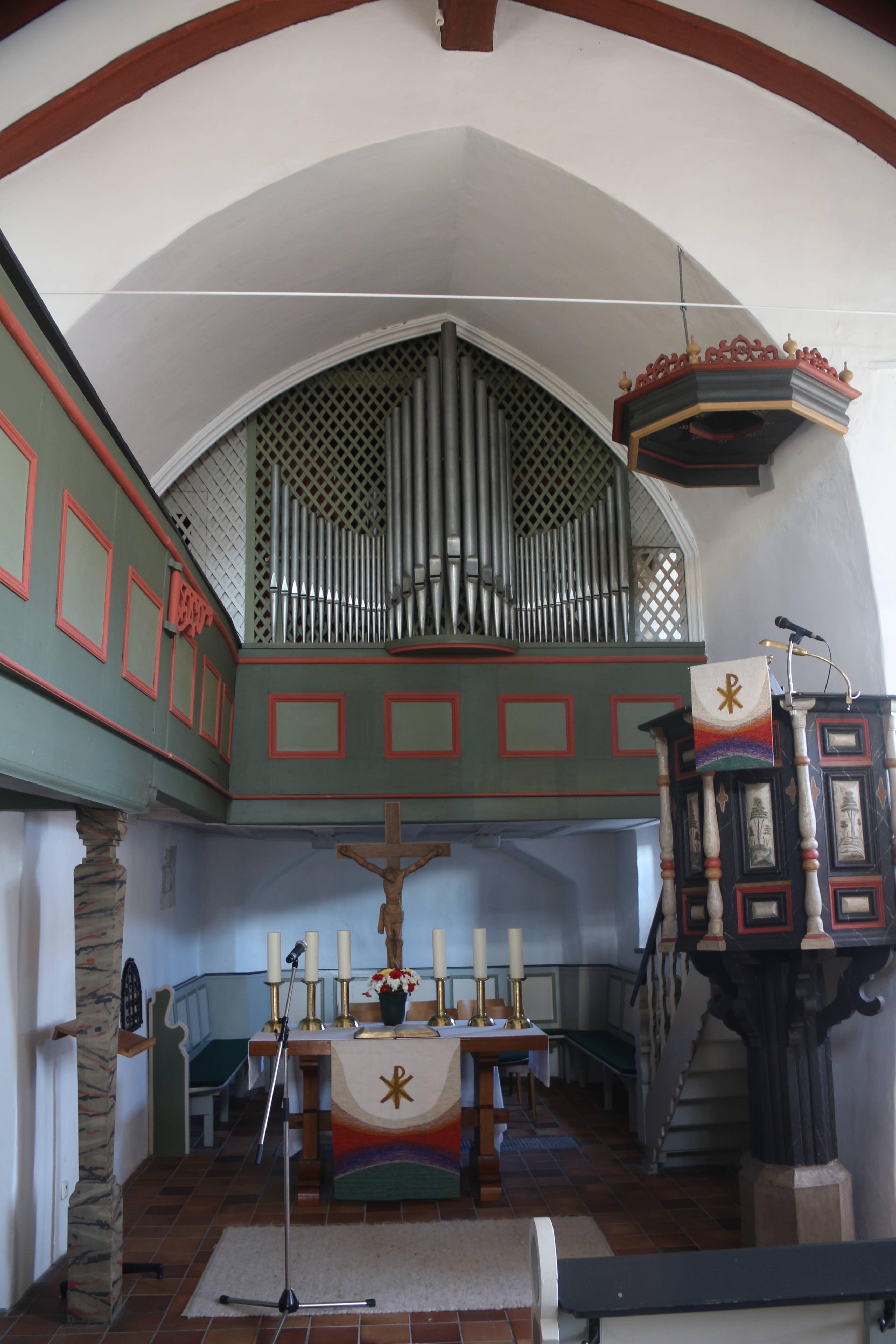 Ev. Kirche Krumbach